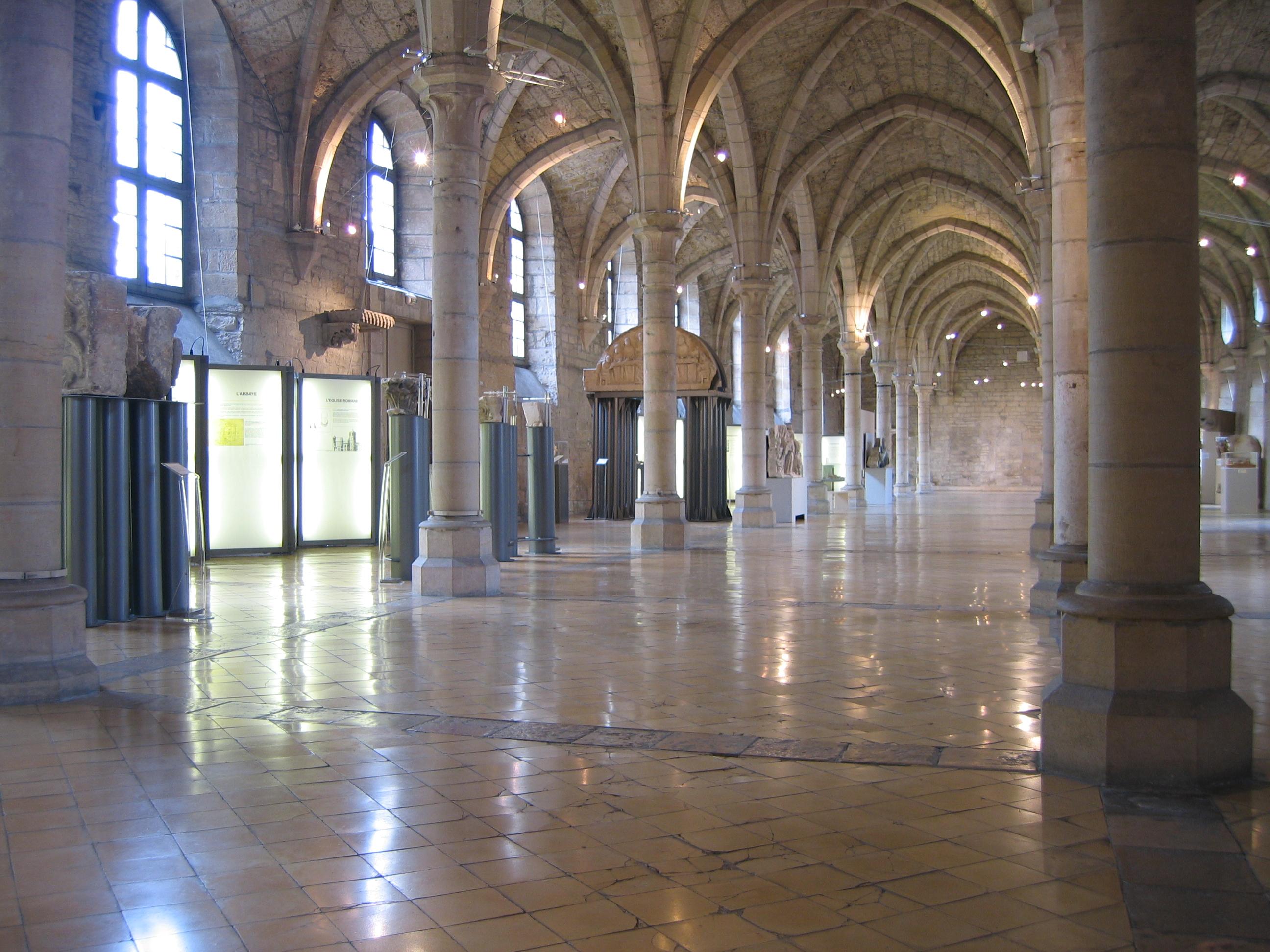 Dortoir des moines dans l'ancienne abbaye bénédictine Saint-Bénigne Dijon France